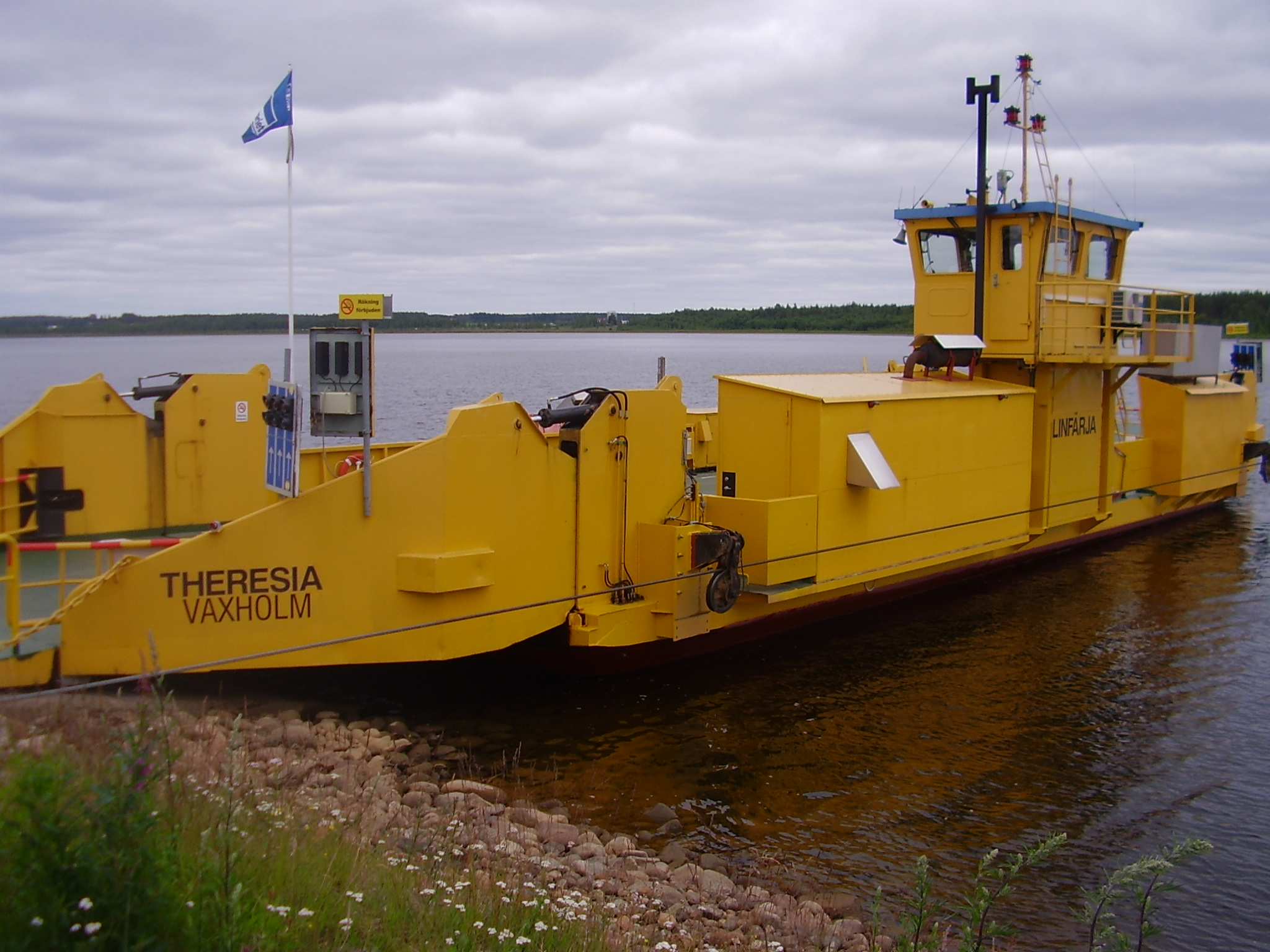 Bilfärjan Theresia, som går på Avanleden över Lule älv